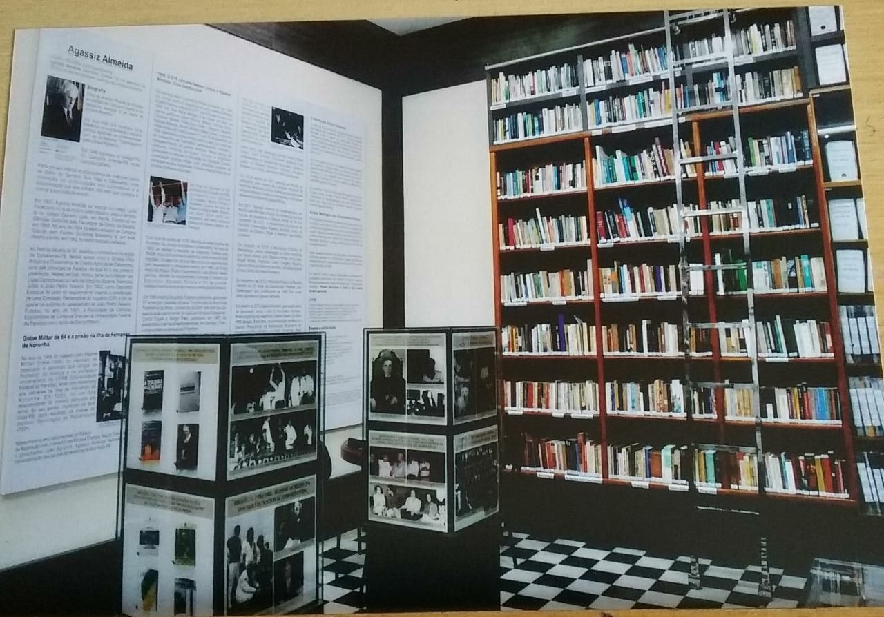 Foto da inauguração do Memorial Agassiz Almeida